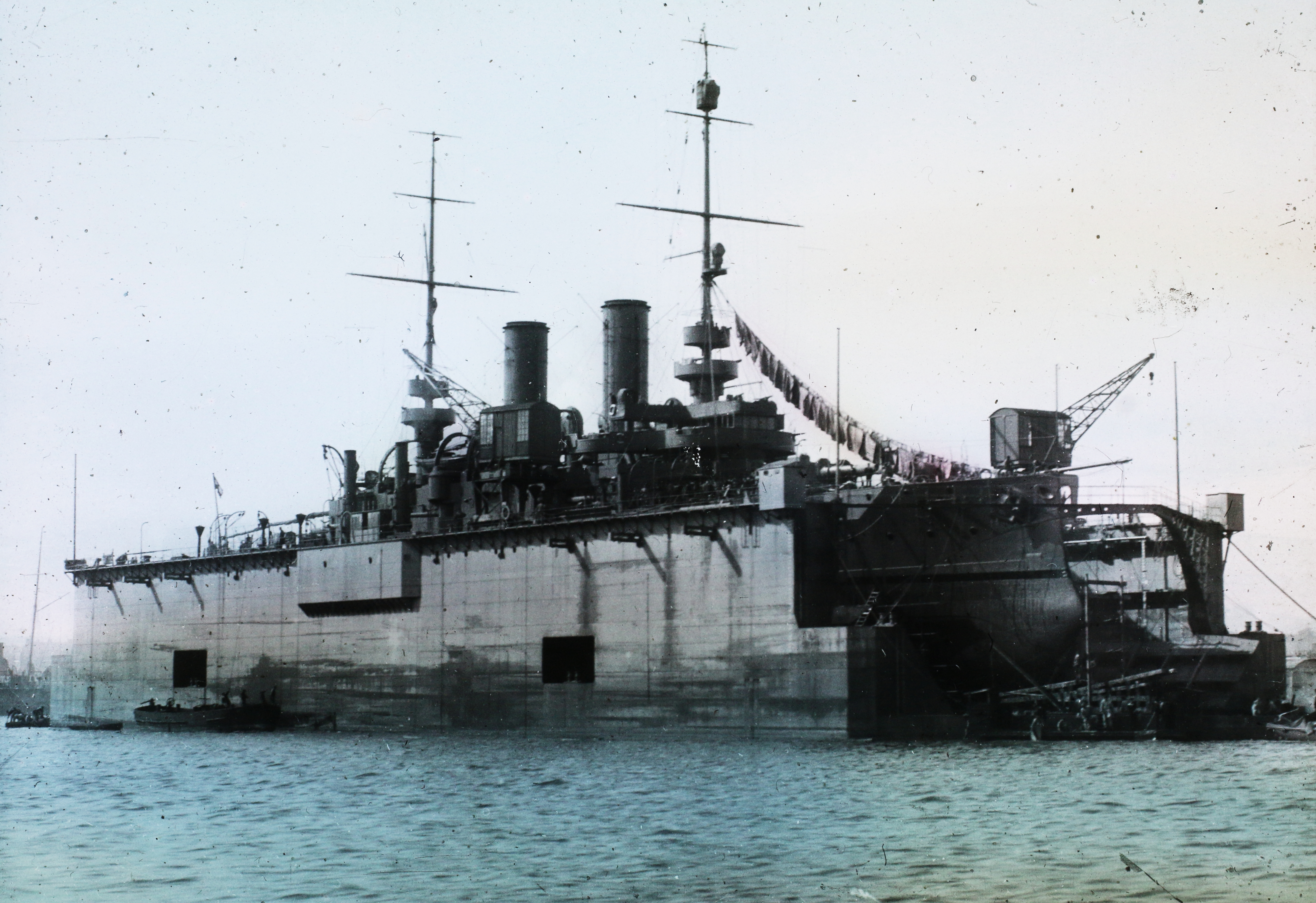 a k.u.k. haditengerészet kikötője, a úszódokkban egy Habsburg-osztályú csatahajó. Location: Croatia, Pula Tags: warship, graving dock, Austro-Hungarian Empire Title: a k.u.k. haditengerészet kikötője, a úszódokkban egy Habsburg-osztályú csatahajó.